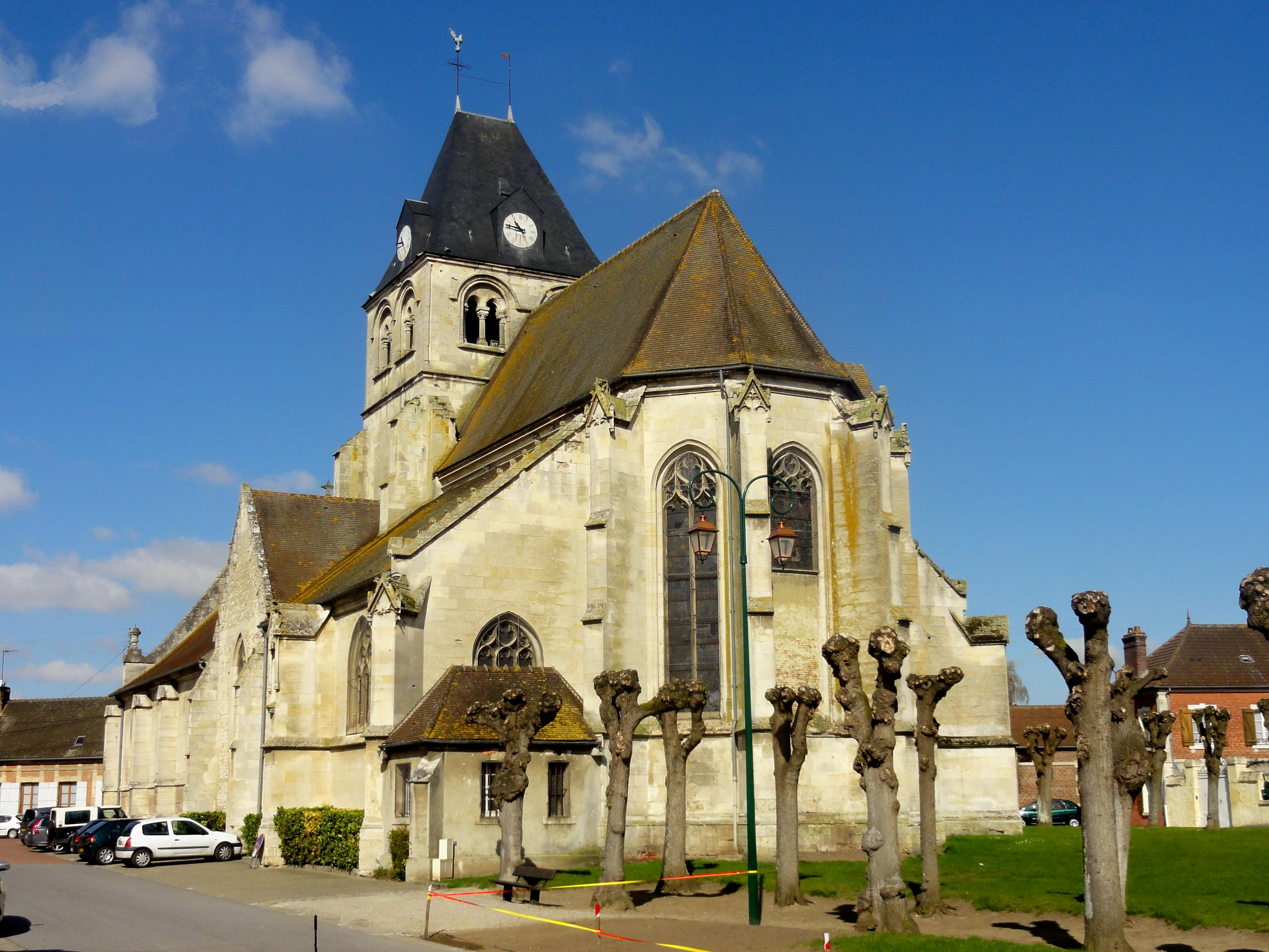 Vue depuis l'est.